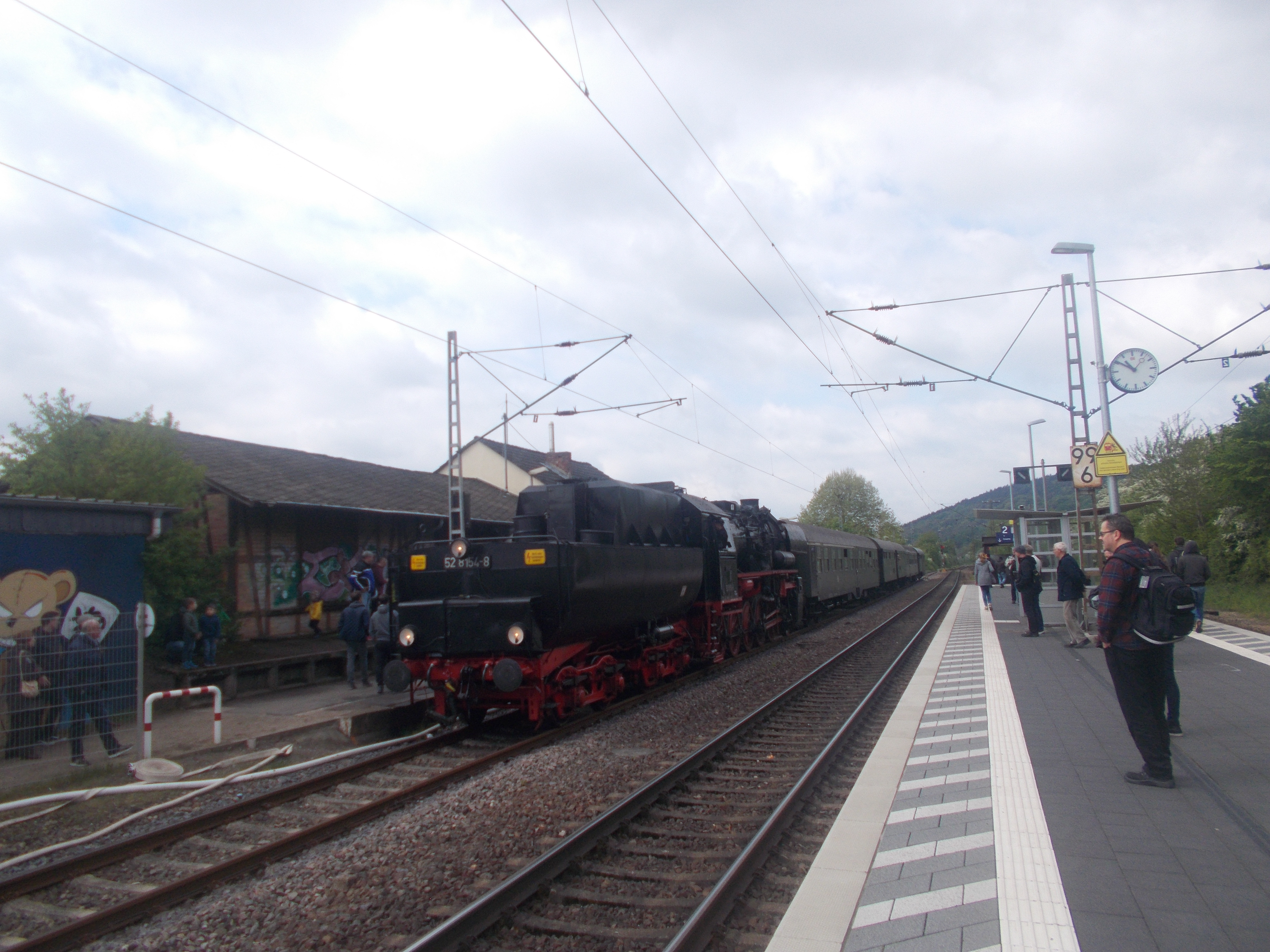 Bahnhof der Stadt Schweich beim Dampflokspektakel 2018